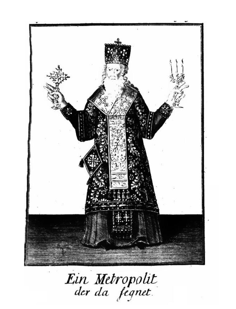 Documentu conţine imaginea unui mitropolit grec de la 1700